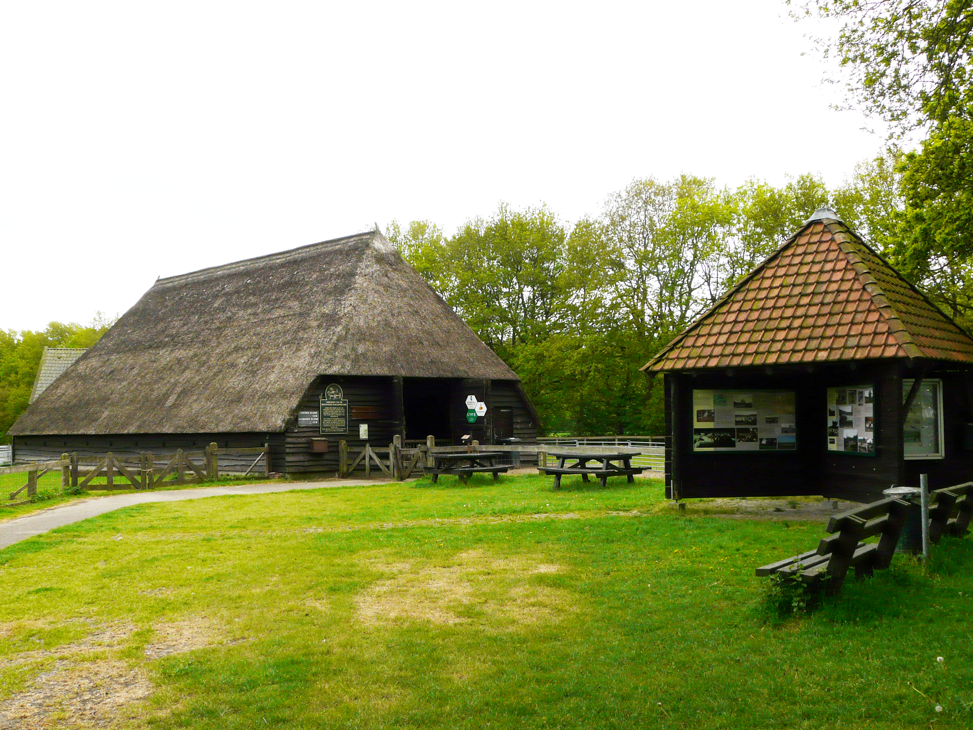 Voormalige Holtinger schaapskooi bij Uffelte